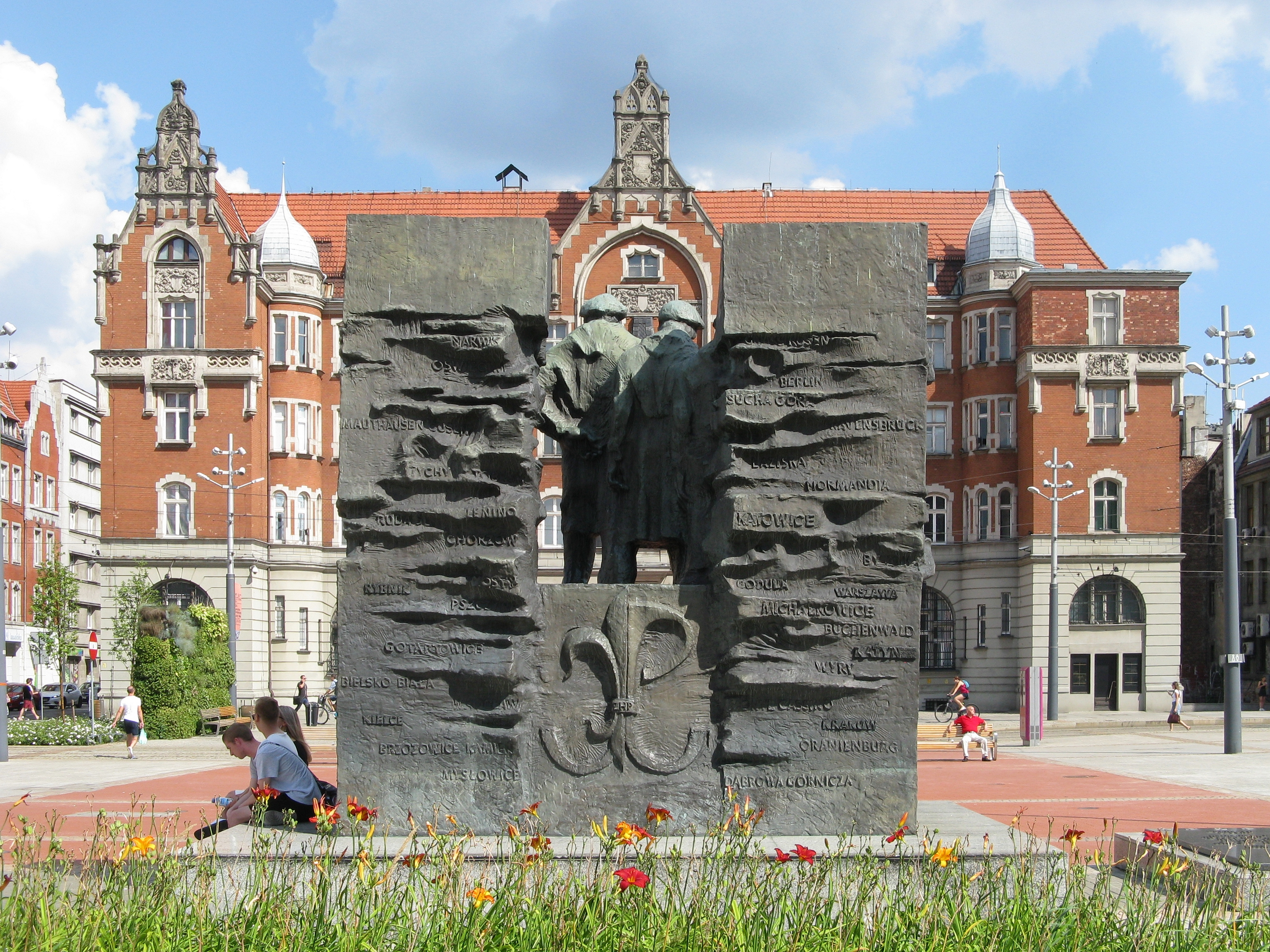 Pomnik Harcerzy Września w Katowicach (tył), w tle gmach przy Alei Wojciecha Korfantego 3.